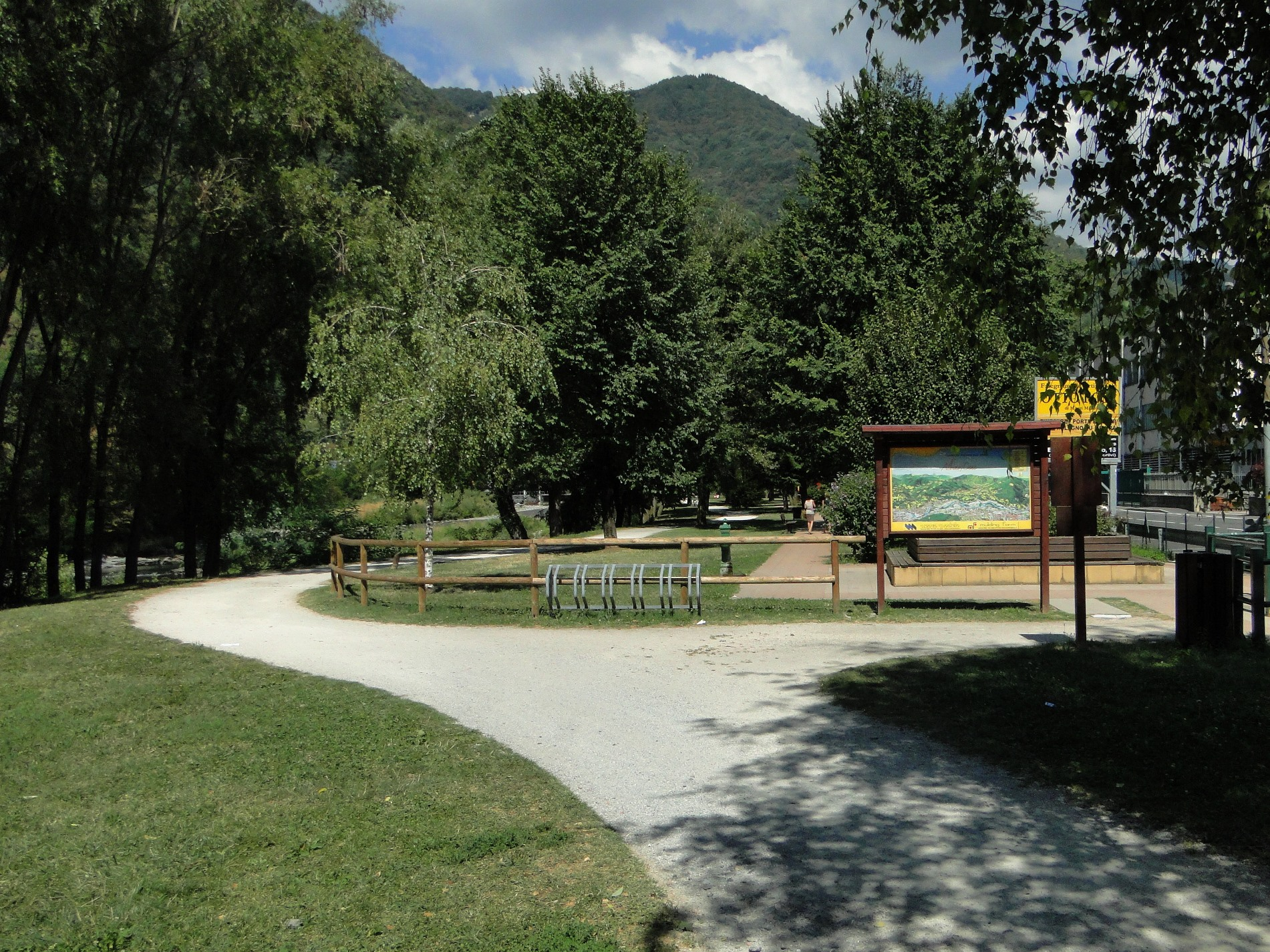 Pista ciclopedonale. Cene (BG), Italia